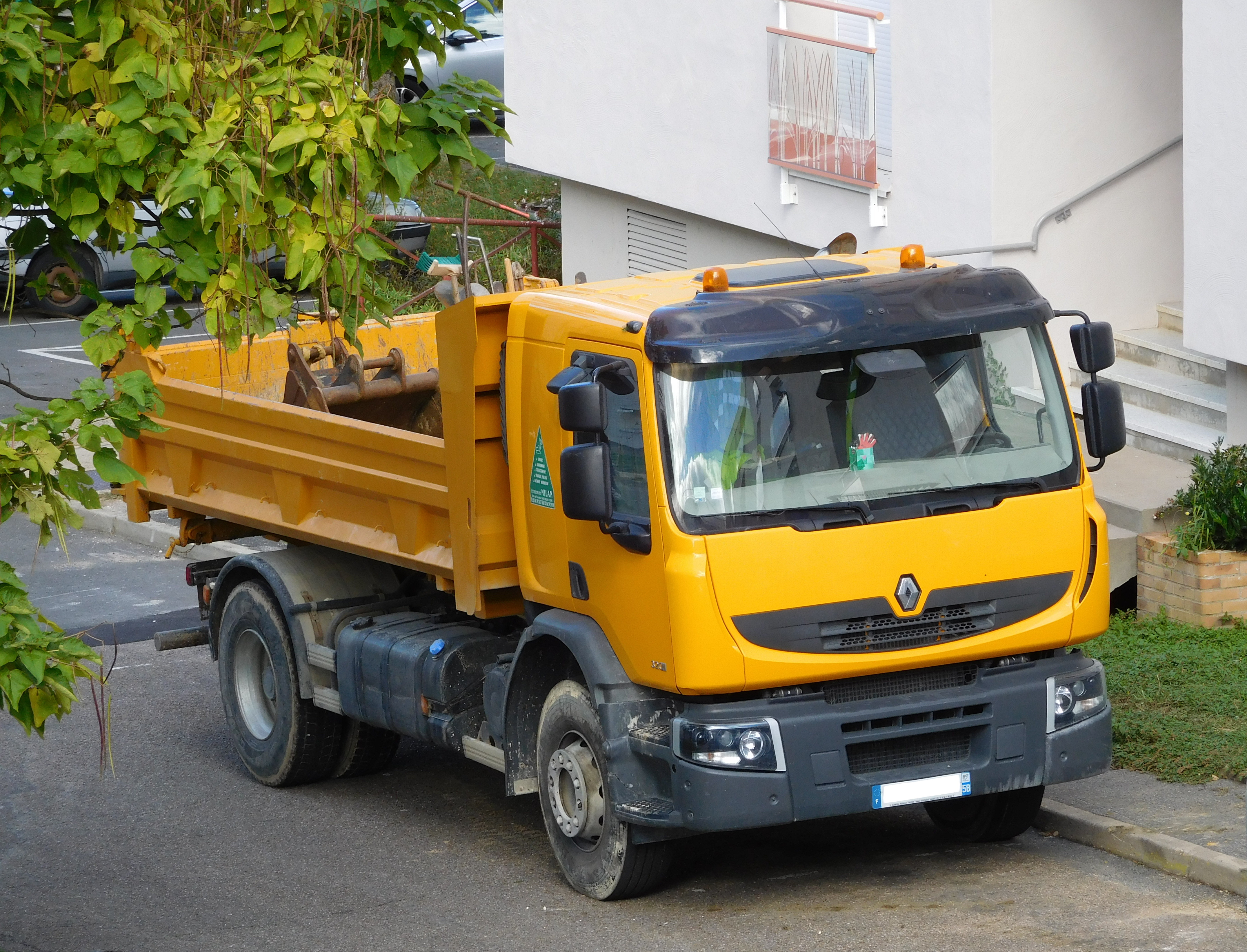 Camion benne Renault Premium Lander 320. Moteur DXi7 de 320 ch.